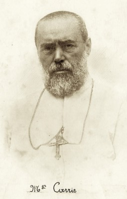 Portrait Mgr Hipolytte Carrie